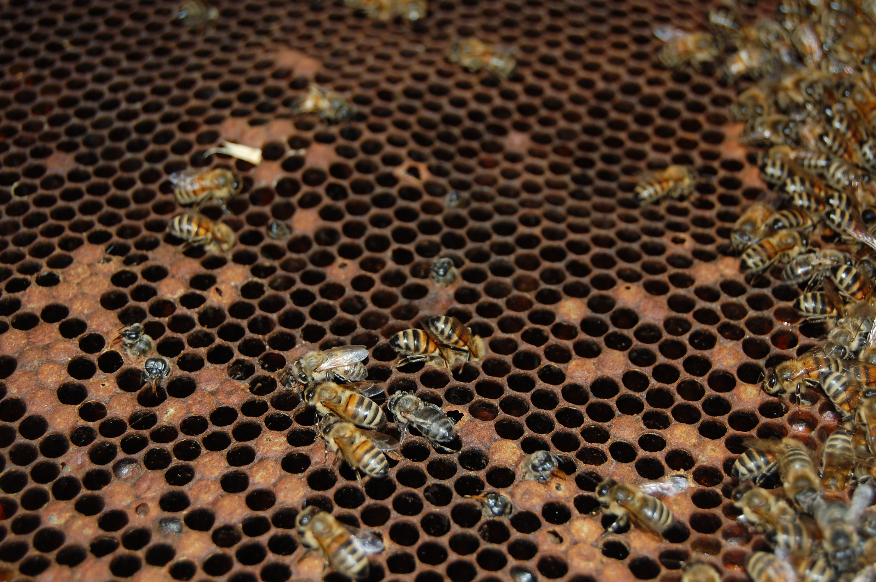 Tipico aspetto della covata colpita da peste americana